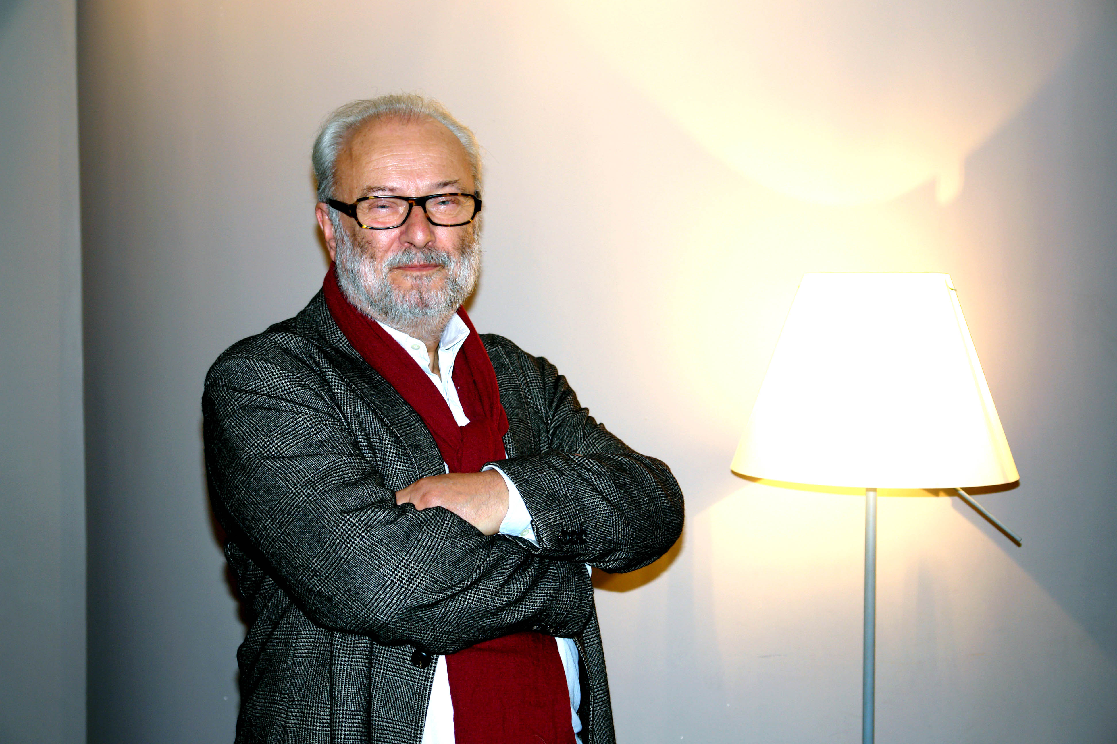 Gérard Corbiau au Festival international du film francophone de Namur 2012, le 05 octobre.